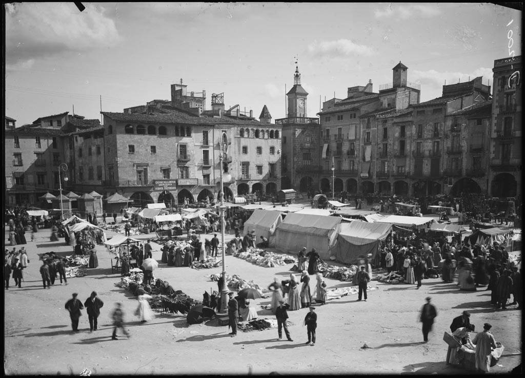 Imatge